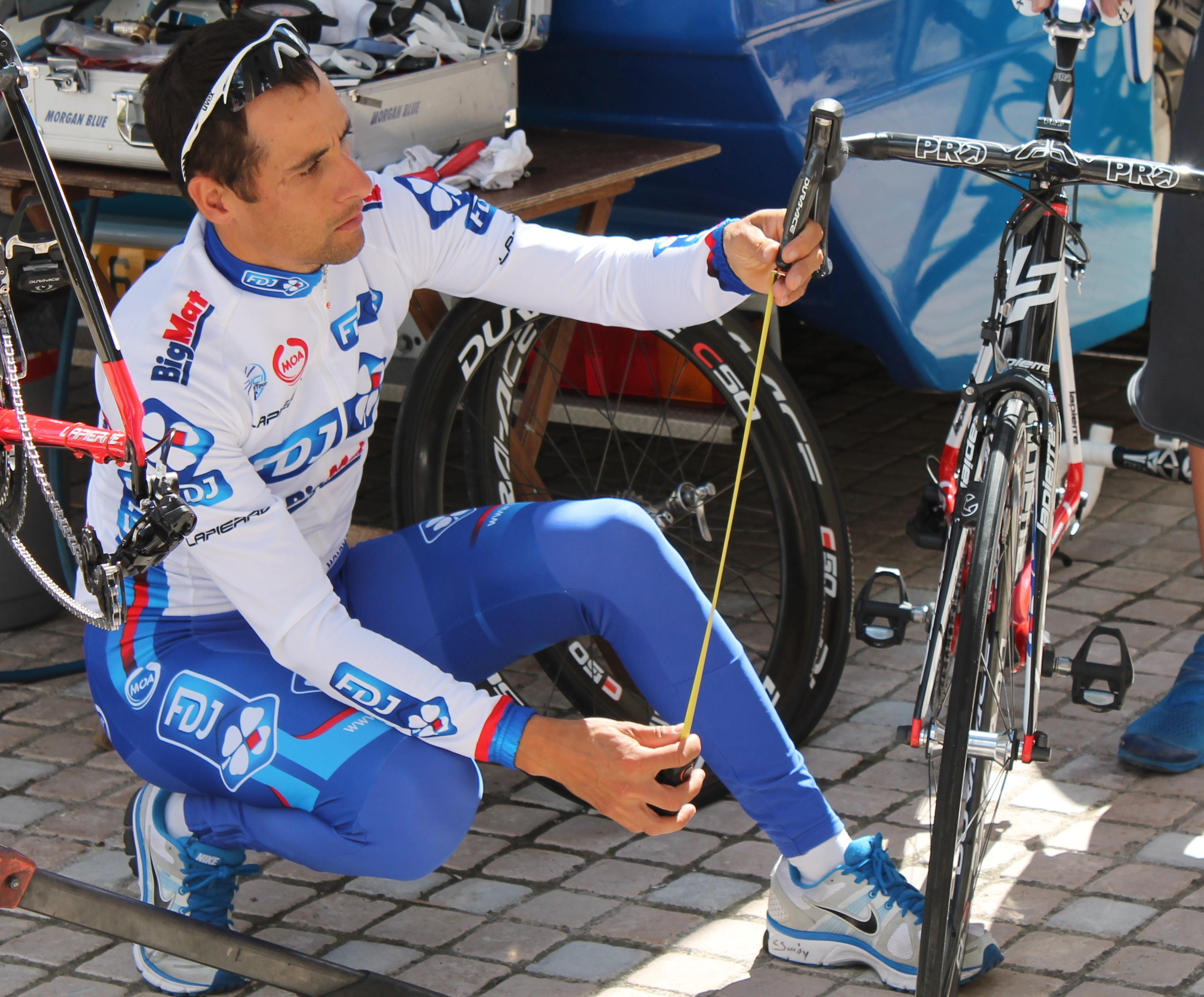 Sandy Casar peaufine les réglages de son vélo la veille du départ de la Route du Sud 2012, à Lacaune.